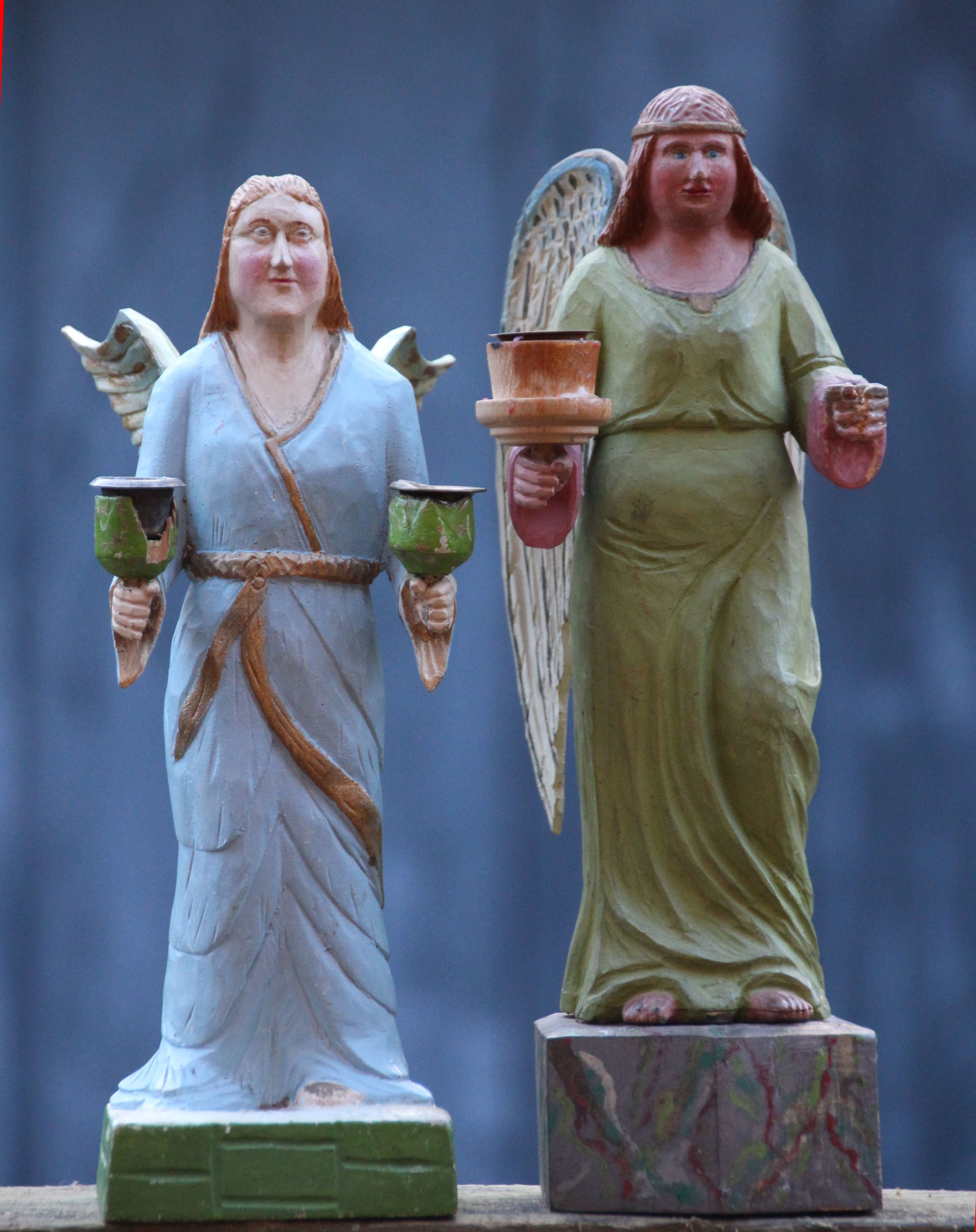 Lichterengel: „Beinengel“ werden im Erzgebirge (dort in Erzgebirgisch Baaengel) die lichtertragenden Engel genannt, bei denen der Rock nicht bis zum Sockel reicht, auf dem sie stehen, sondern die Füße und ein Teil des Beins zu sehen sind. Die Herstellung bei gedrechselten Figuren ist aufwändiger, da nicht der ganze Rumpf durch Holzdrechseln hergestellt werden kann, sondern der untere Teil des Körpers geschnitzt werden muss. Hier geschnitzte Engelfiguren, die zu datieren sind auf die Zeitspanne von Anfang bis Mitte des 20. Jahrhunderts, möglicherweise entstanden sie schon ausgangs des 19. Jahrhunderts. Sie gehören zur Sammlung DS.